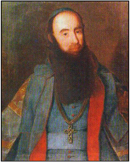 Иосиф Иван Шумлянский (1643 — 1708) — украинский церковный деятель Речи Посполитой